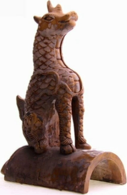 斗牛，古代神兽